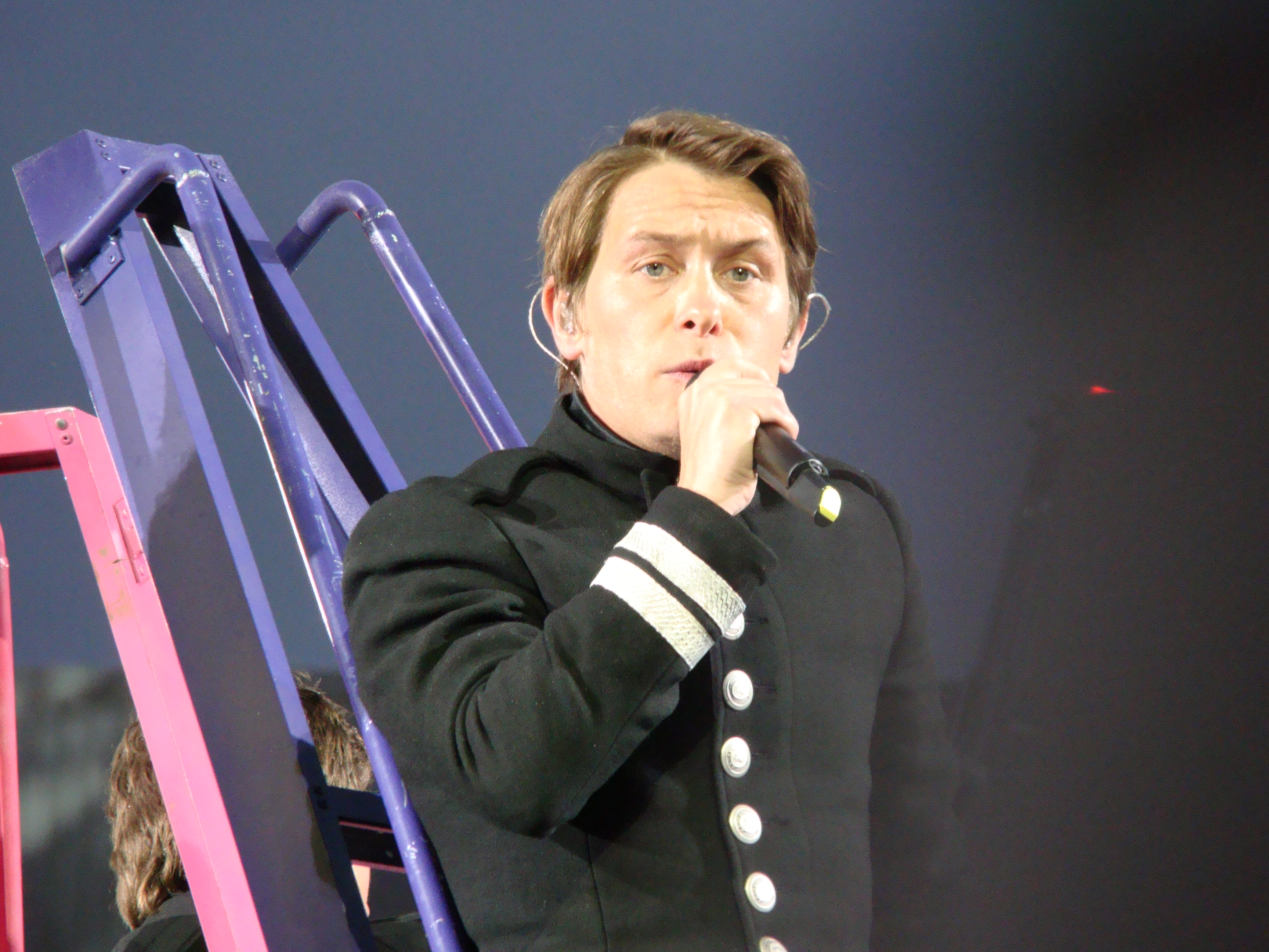 Take That